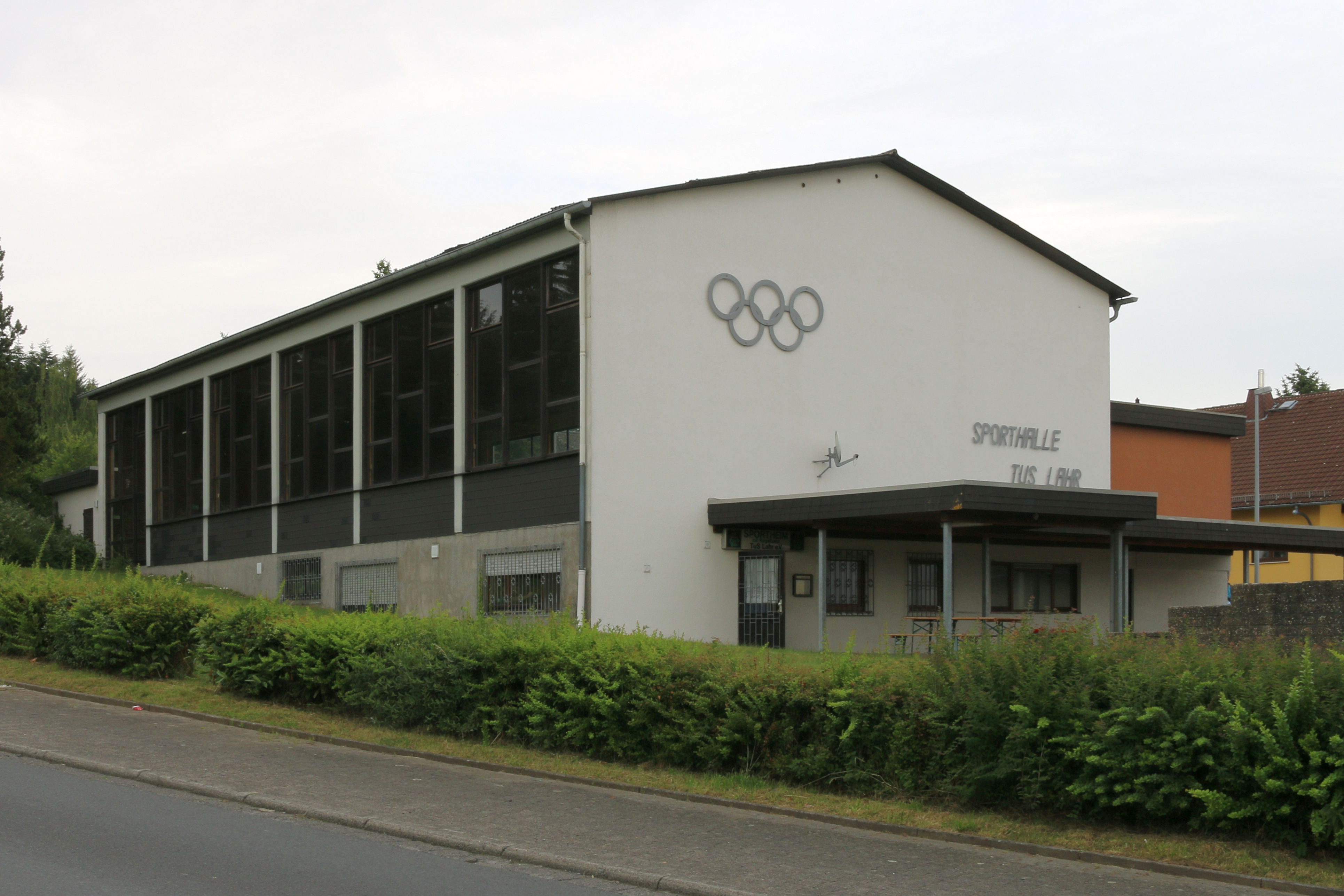 Lahr, Waldbrunn (Westerwald): Turnhalle